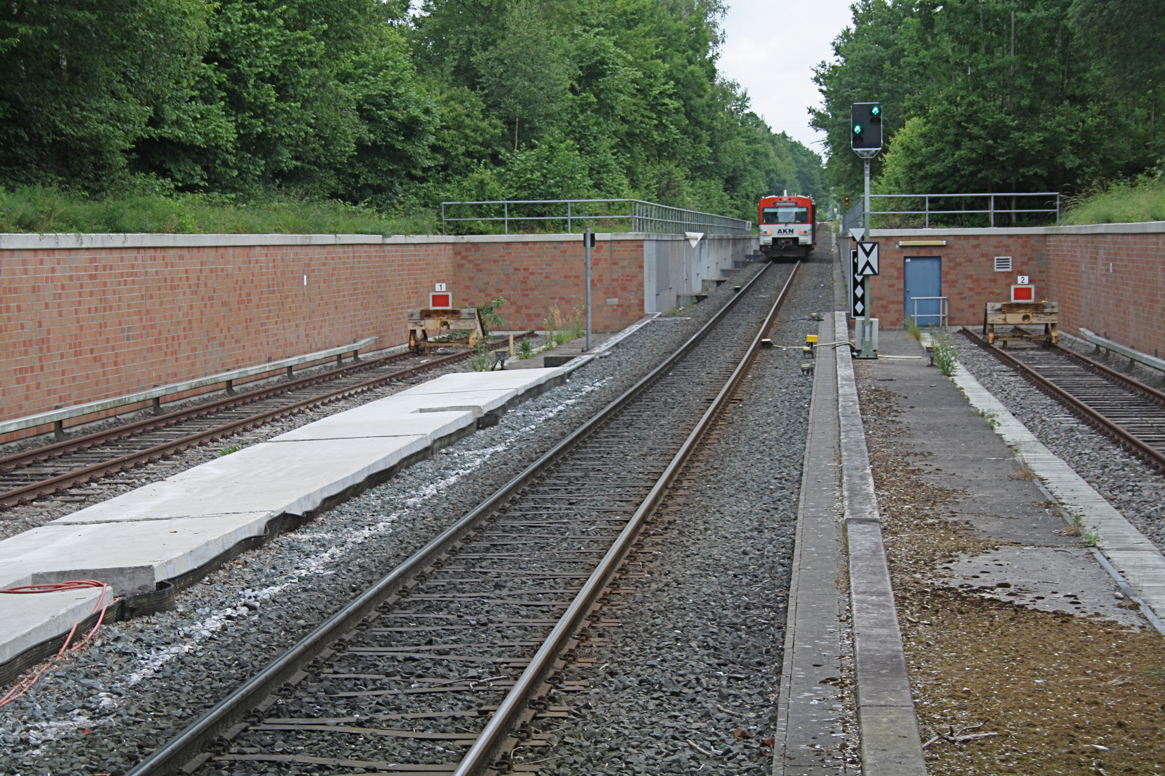 Bahnhof Norderstedt Mitte, Nordkopf